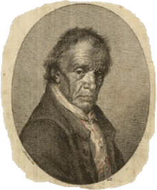 Valerio da Pos (Canale d'Agordo 1740 - 1822) La riproduzione è di pubblico dominio, poichè l'autore, un certo Lorenzi, quasi sicuramente è deceduto da più di 70 anni, così come l'incisore (un certo Bosa) considerato che si ritiene sia stata realizzata nel 1822, pur essendo pubblicata nel 1898. Immagine prelevata dal sito